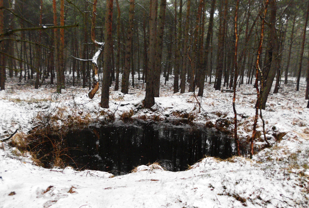 Trunnenmoor